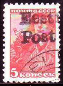 Почтовая марка Элвы (Эстония)